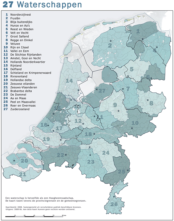 27 Waterschappen. Situatie 2008.